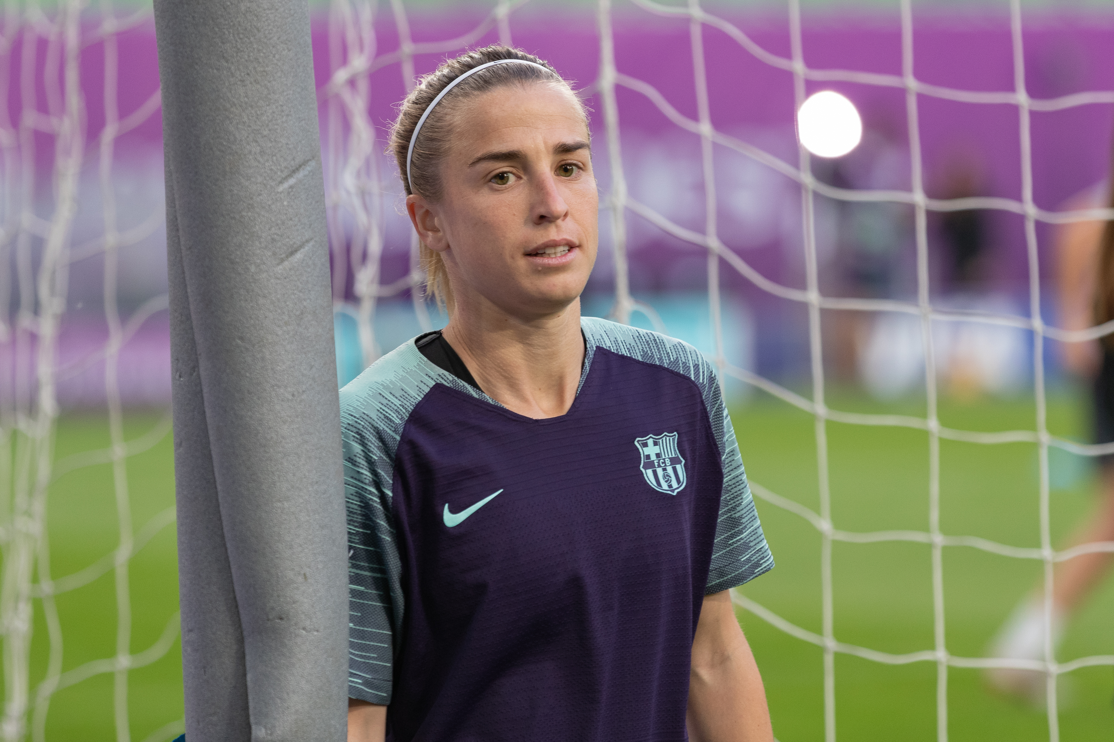 Barbara Latorre (FC Barcelona, 19) beim Abschlusstraining